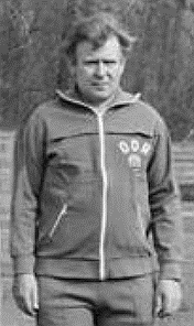 Title: Mannschaftsfoto der DDR-Fußball-Juniorenauswahl Factual corrections and alternative descriptions are encouraged separately from the original description. Additionally errors can be reported at this page to inform the Bundesarchiv. Original historic description: ADN-ZB-Kluge-3.5.80-Leipzig: Mannschaftsbild der DDR-Juniorenauswahl 1980. Stehend v.l.: Trainer Hermann Bley, Rainer Ernst, Gerd Seifert, Peter Englisch, Ranian Holata, Carsten Sänger, Frank Rillich, Falko Götz, Lars Petzold, Trainer Werner Basel. Hockend v.l.: Bernd Nemetscheck, Lutz Radtke, Andreas Rath, Thomas Michaelowski, Markus Henkel, Andreas Zachhuber, Uwe Bredow, Jochen Illert. Das XXXIII. UEFA-Juniorenturnier findet vom 16.-25.5.1980 in der DDR statt.